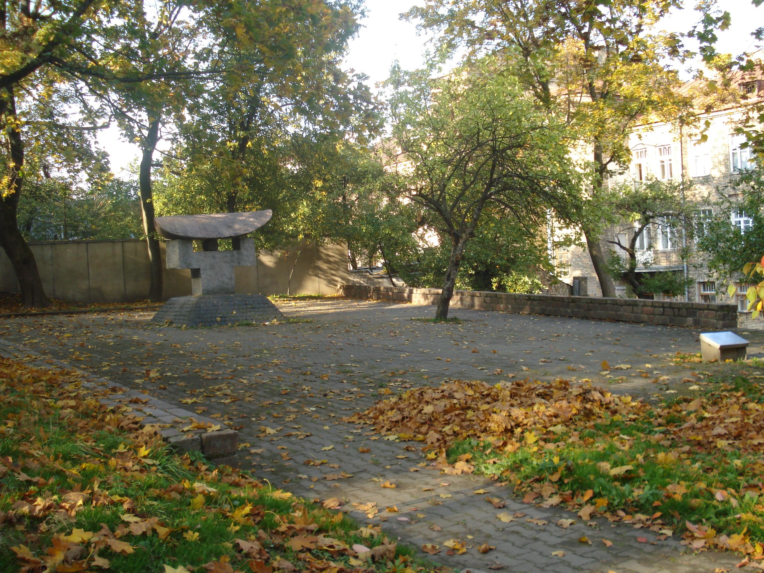 Chiune Sugihara memorial in Vilnius (Pamėnkalnio g.) by Vladas Vildžiūnas and Goichi Kutogawa. Erected in 1992.